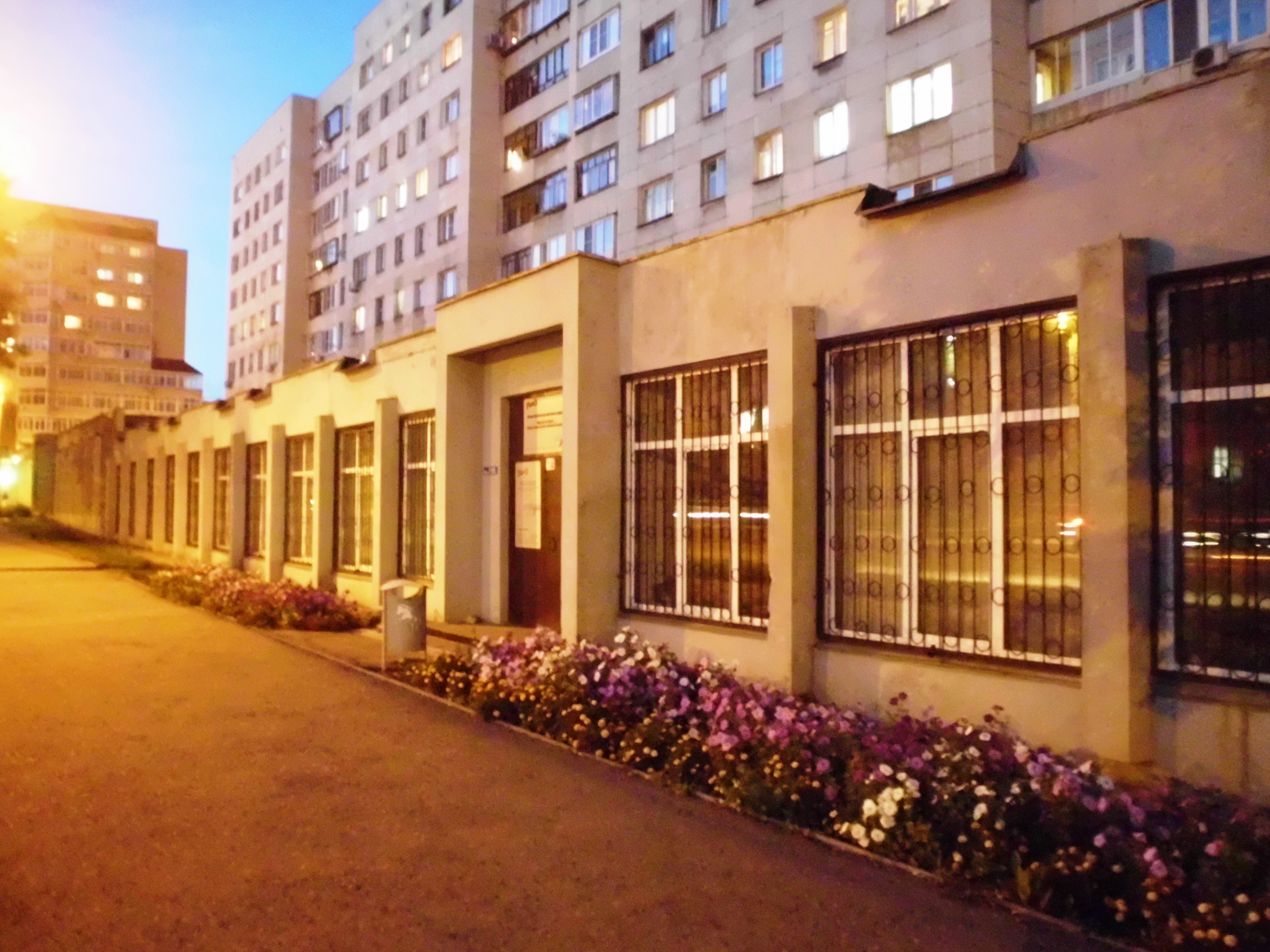 Музей истории Южно-Уральской железной дороги. Город Челябинск, центральная часть пристроя жилого дома на ул. Цвиллинга, 61. Ранее данный пристрой к зданию полностью занимала библиотека татарской и башкирской литературы, ныне располагается в левой части здания.